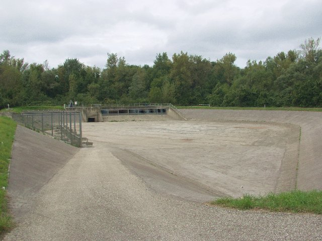 Regenrückhaltebecken im Süden von Linz - selbst fotografiert im September 2005 (der greg:) 10.9.2005